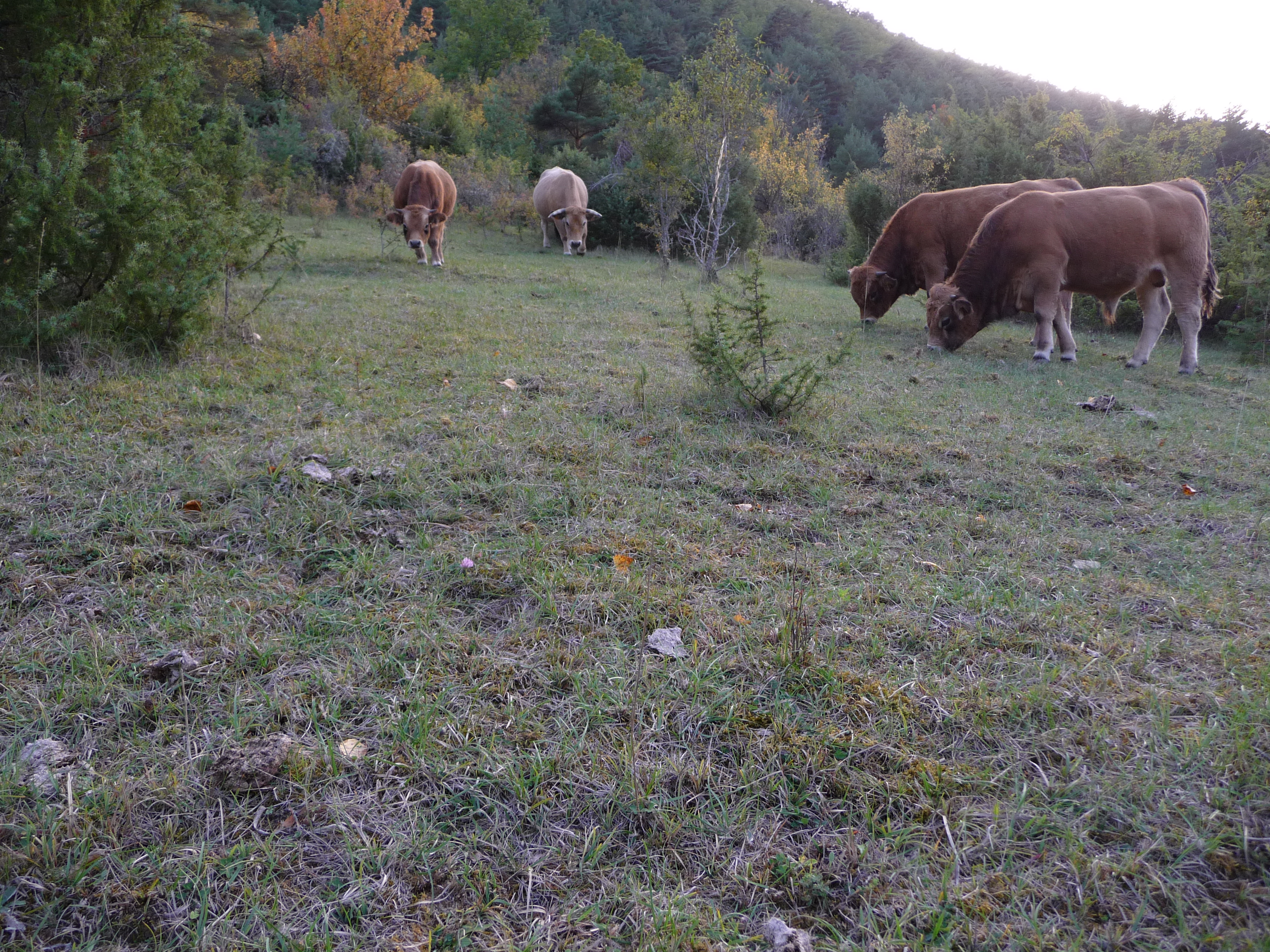 Veaux broutards aubrac(lait+herbe/9 mois)sur du causse.Aveyron sud. Massif central. France